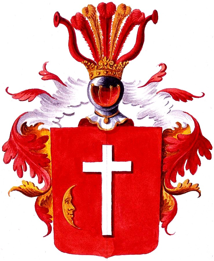 Wappen derer von Bistram (Stammwappen „Tarnawa“), polnischer Uradel, wie es von der Estländischen Linie geführt wird.